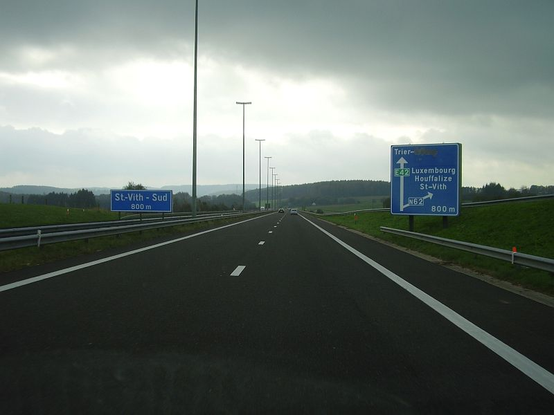 Route E421 au niveau de St-Vith en Belgique